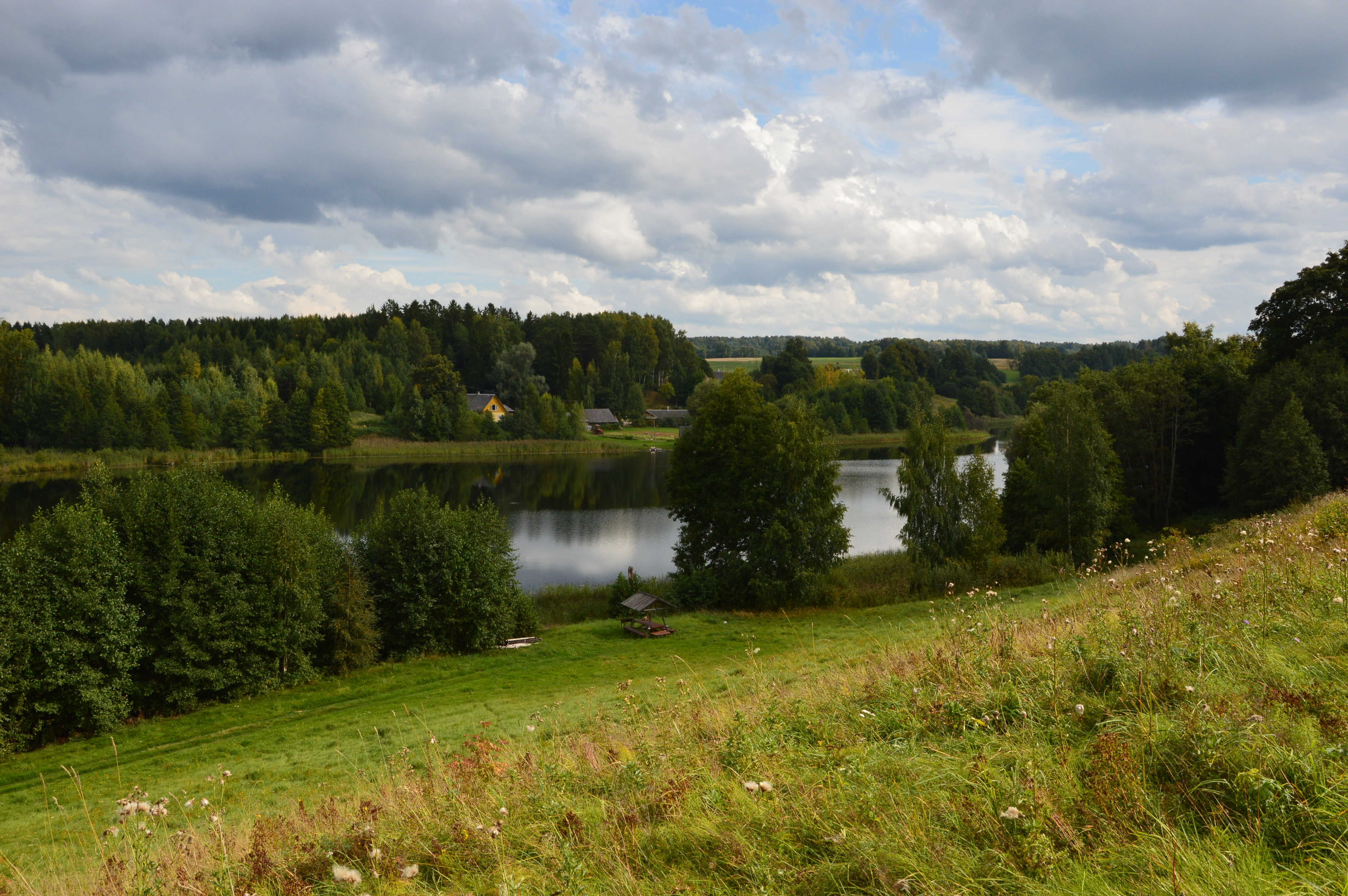 Kahrila järv